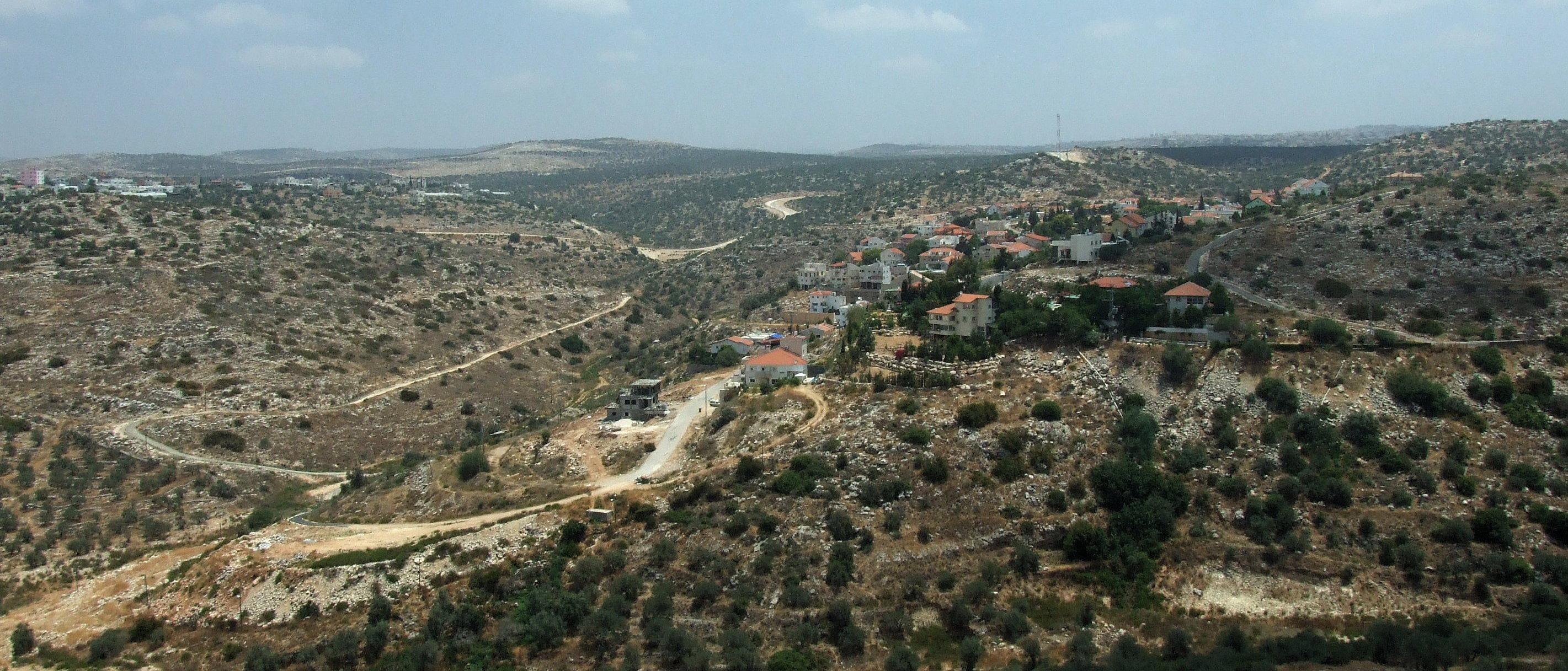 מבט מאלקנה מזרחה לעבר עץ אפריים ושומרון. צולם לפנות ערב, שמש נמוכה מאחרי הצלם.